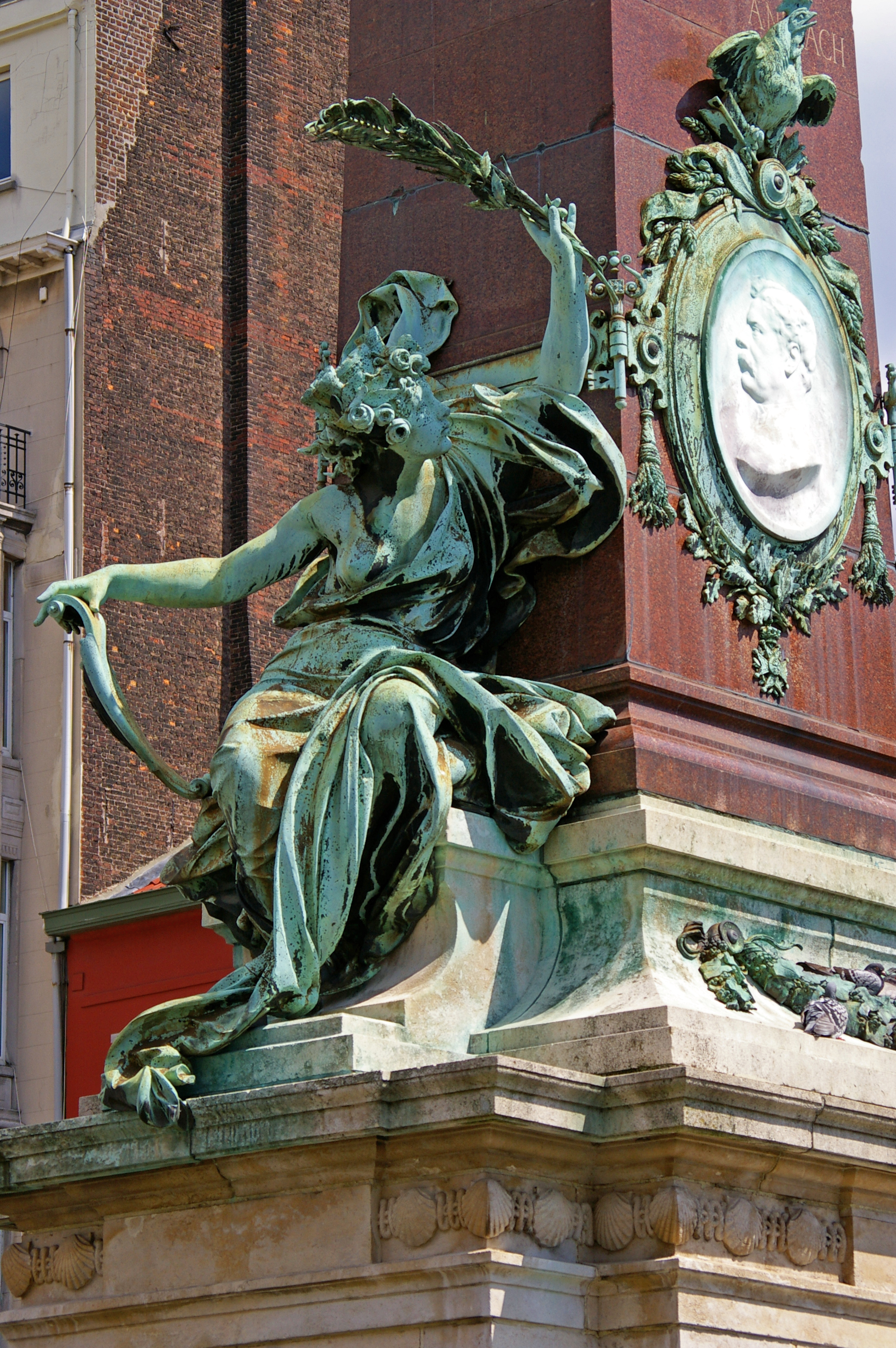 « Quartier Maritime - Fontaine Anspach - Bruxelles par Julien Dillens (1849-1904)